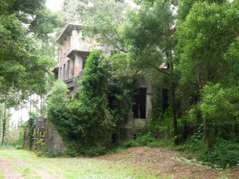 F